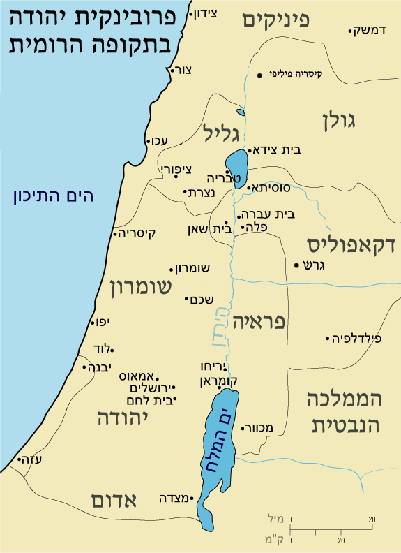 פרובינצית יהודה בתקופה הרומית